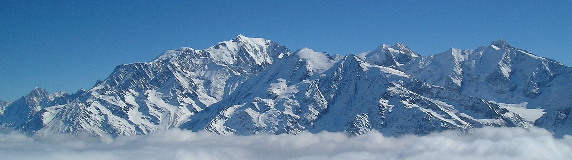 Le Massif du Mont-Blanc, vue depuis la station de sport d'hiver de Les Contamines-Montjoie.